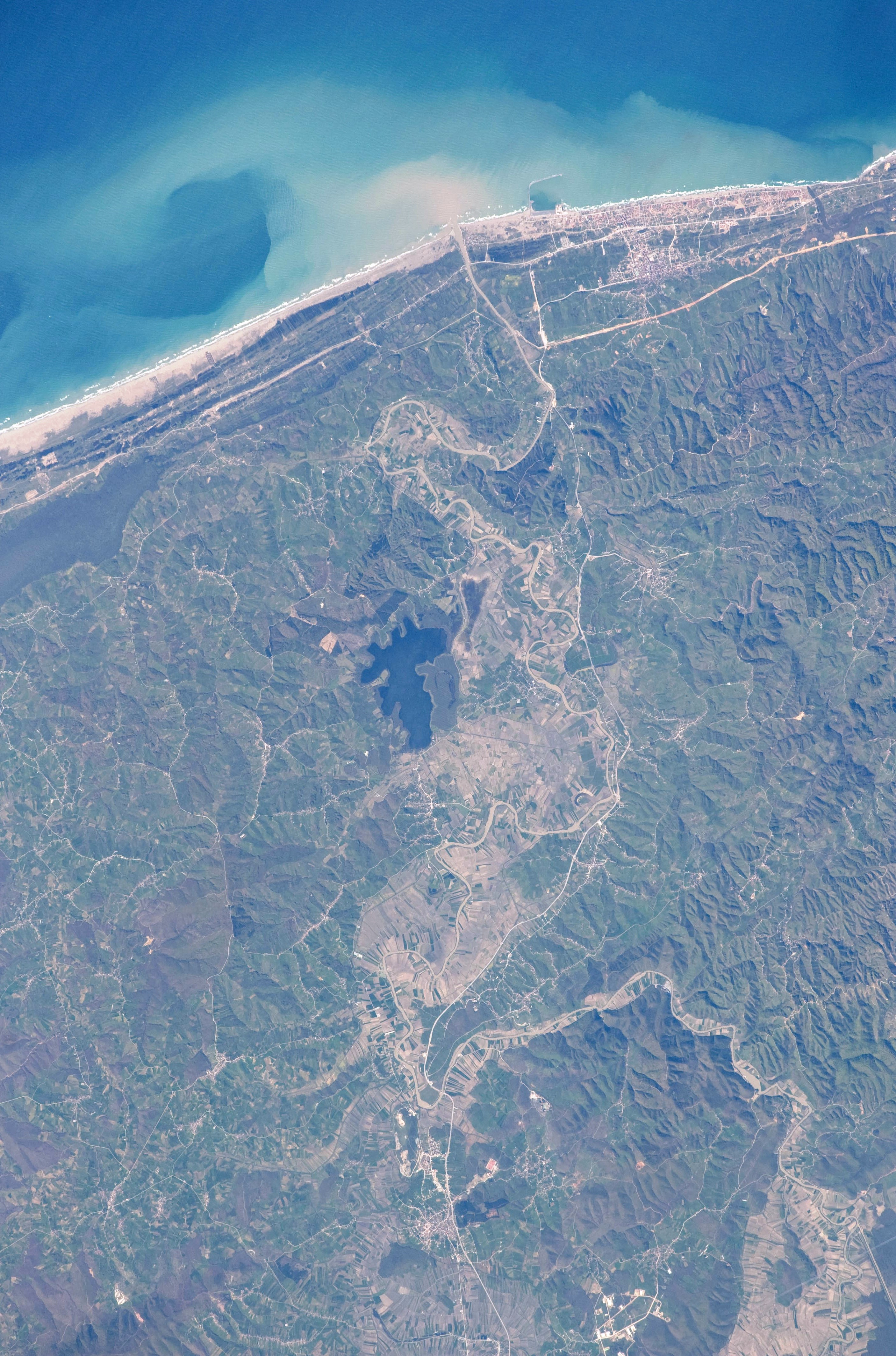 Sakarya Nehri'nden Karadeniz'e sedimantasyon taşınımı.